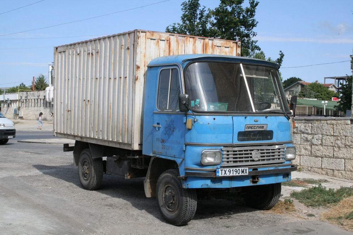 Автомобил Преслав